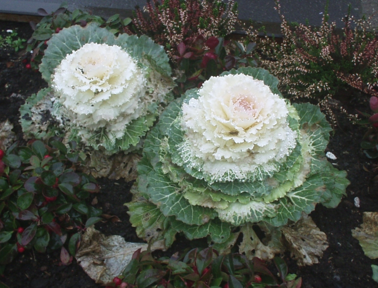 Zierkohl